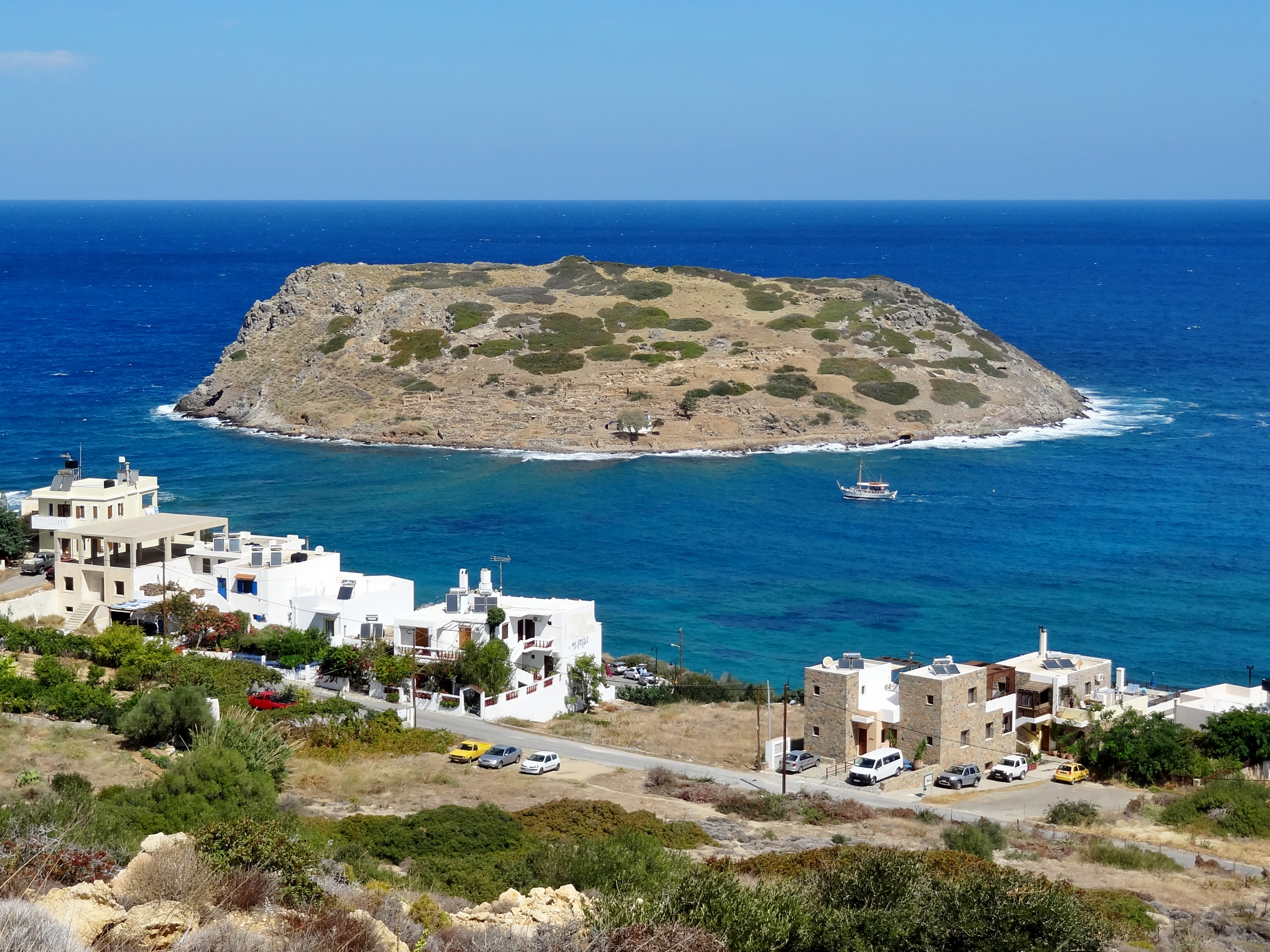 Mochlos (Μόχλος) mit der vorgelagerten Insel Agios Nikolaos (Άγιος Νικόλαος), Kreta, Griechenland